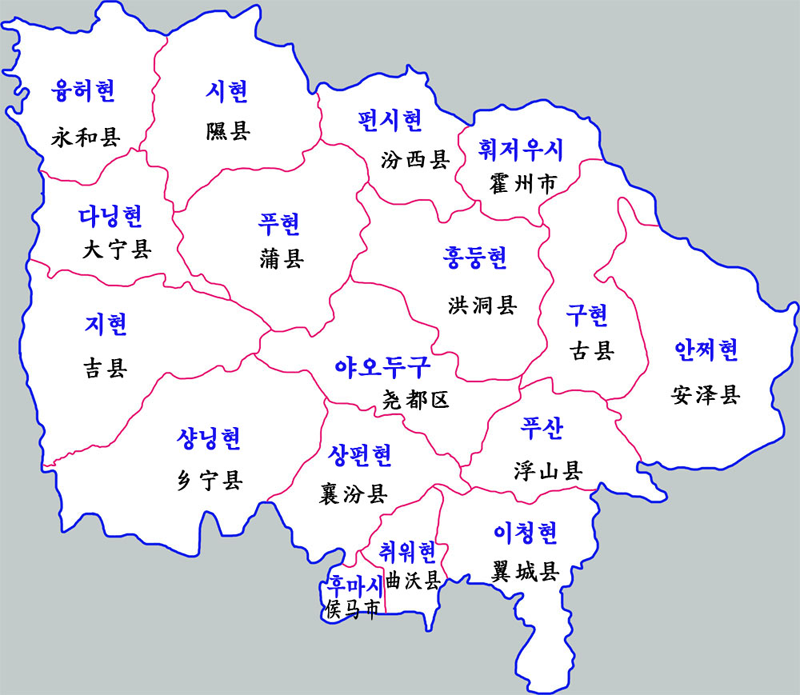 린펀시 현급구역도